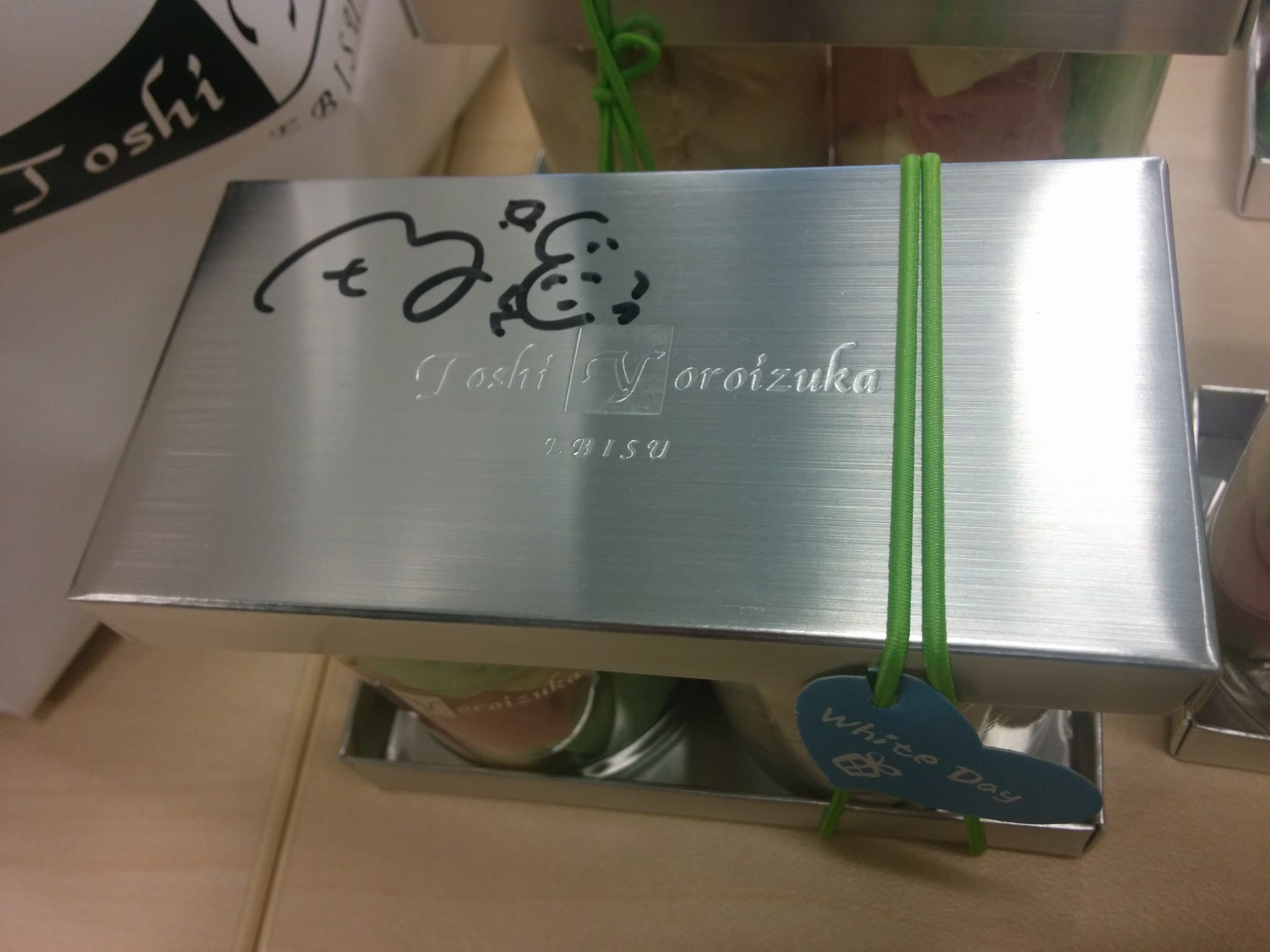 patissier ギモーヴ